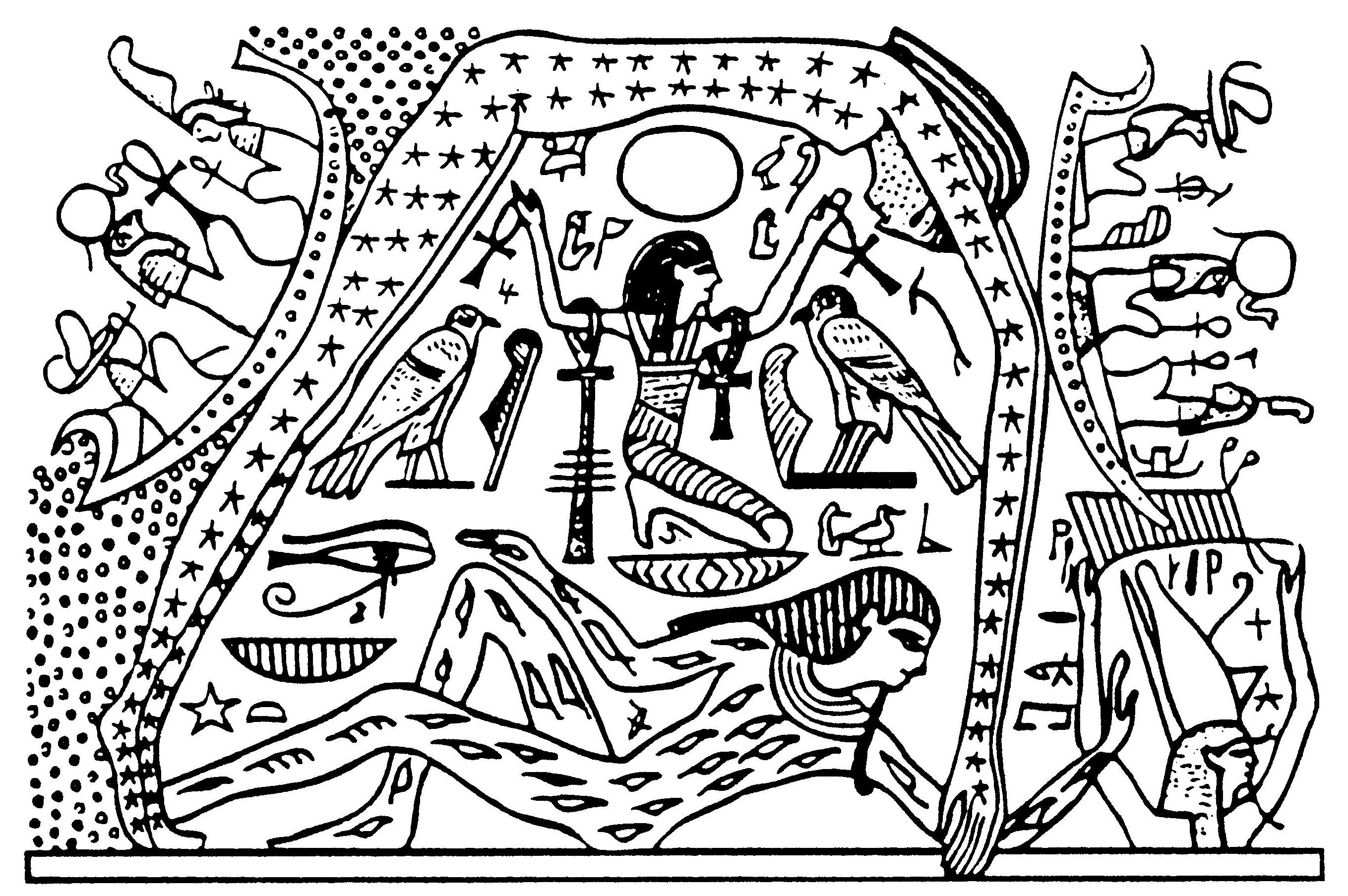 Geb_and_Nut02.jpg